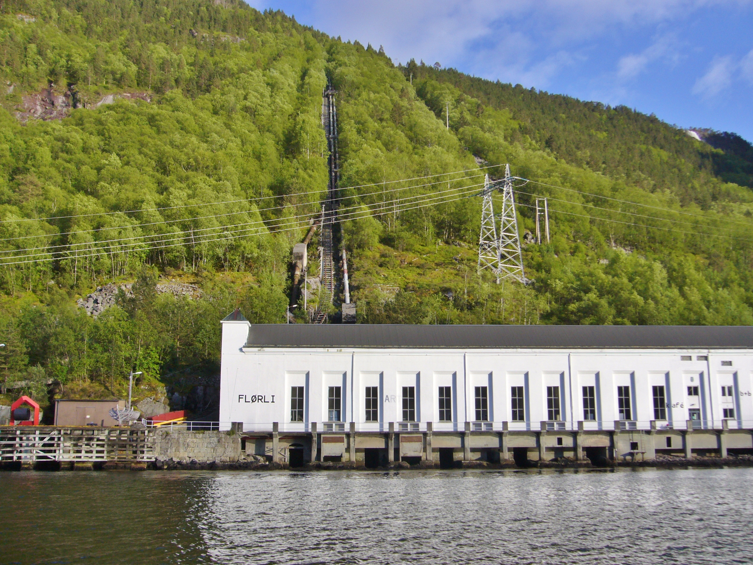 Den historiske kraftstasjonen og røyrgata med trappene